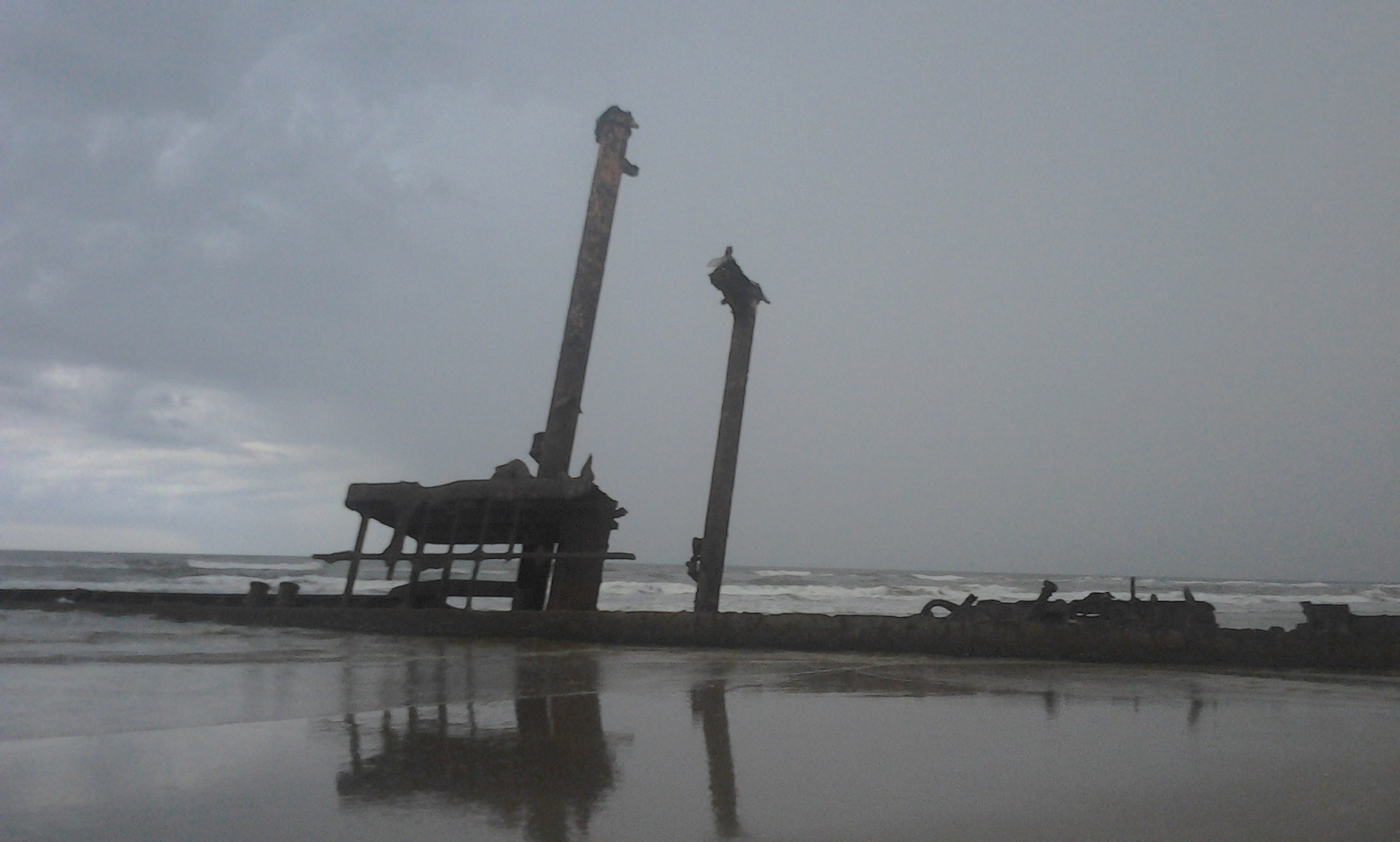 Navio Altair. Encalhado desde 1976. Está há cerca de 12 quilômetros da Avenida principal do Balneário Cassino em Rio Grande, RS.